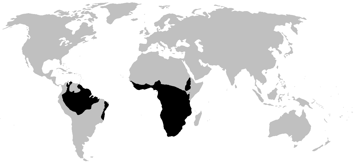 Pipidae distribution map.